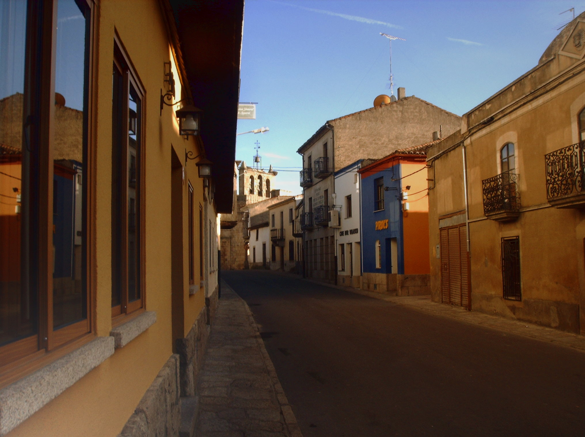 calle de los bares (elcordon.es)